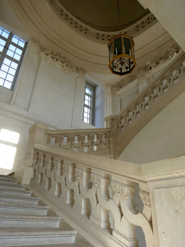 Château de Maisons-Laffitte, Grand escalier